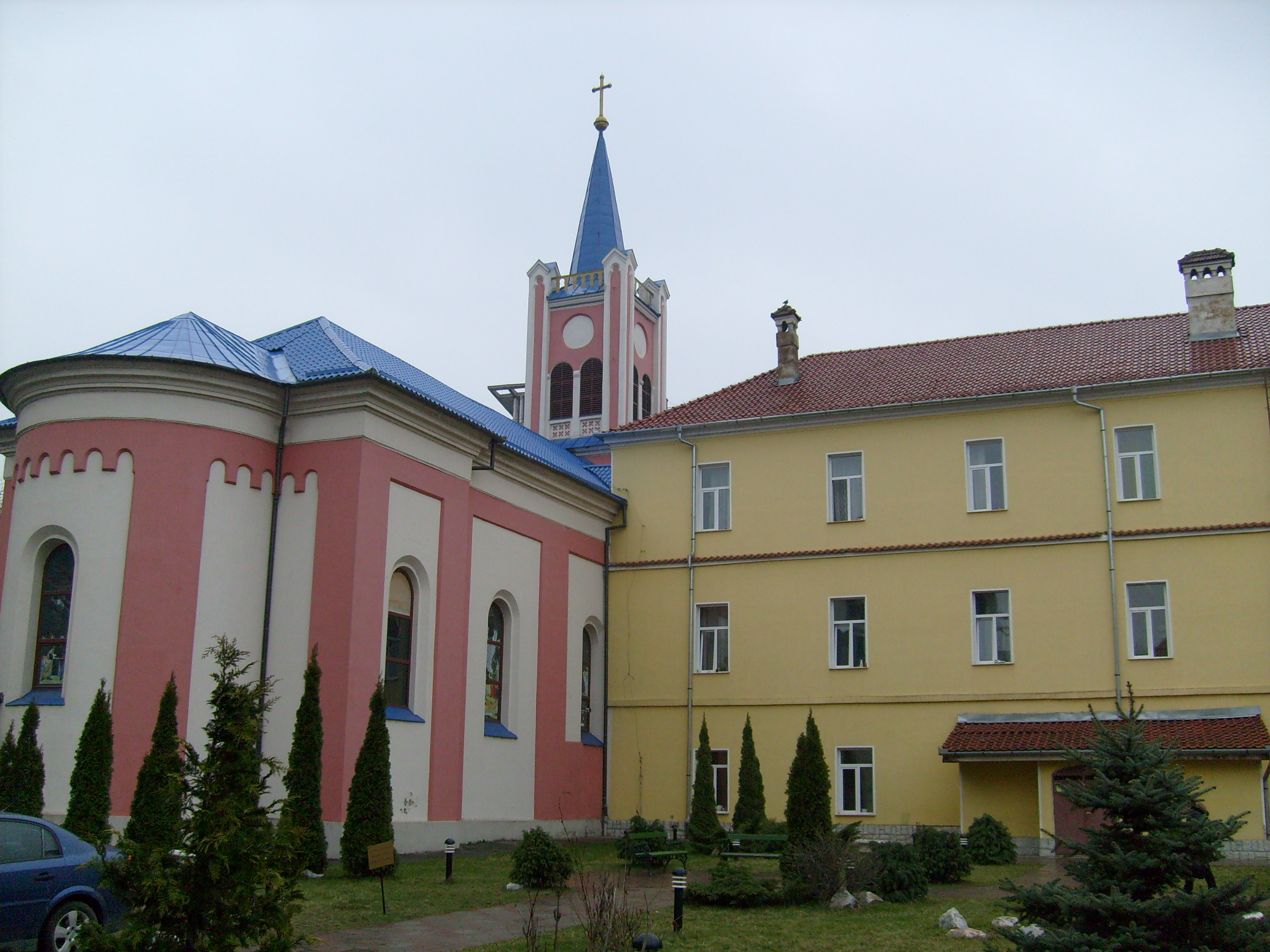 Biserica din incinta Seminarului Greco-Catolic din Oradea (jumatatea sec. al XIX-lea).